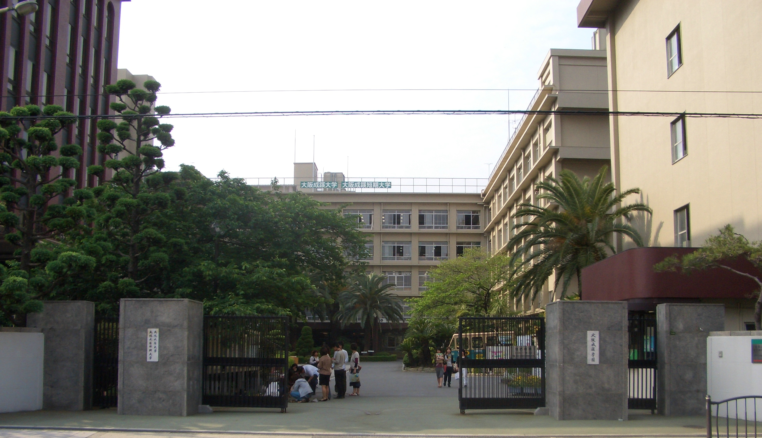 大阪成蹊大学。 OSAKA SEIKEI UNIVERSITY。